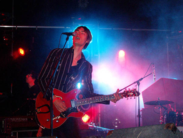 Gustaf Norén på storsjöyran 2006